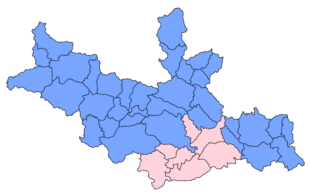 Candidats arrivés en tête suivant les communes de la première circonscription législative de la Vendée, lors du second tour des élections législatives de 2012 (17 juin 2012). En bleu clair, Alain Lebœuf arrivé en tête ; En rose, Martine Chantecaille arrivée en tête.